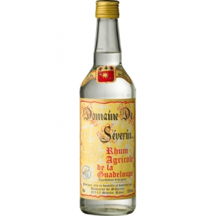 Photo de la bouteille de rhum blanc agricole de Guadeloupe : Séverin